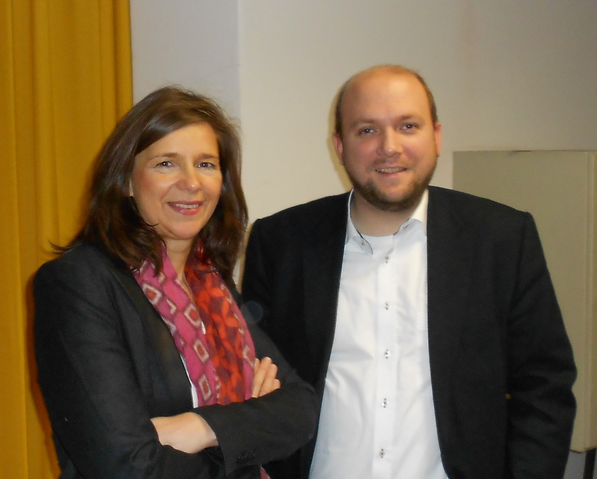 Katrin Göring-Eckardt und Manuel Sarrazin (Hamburg 2014)